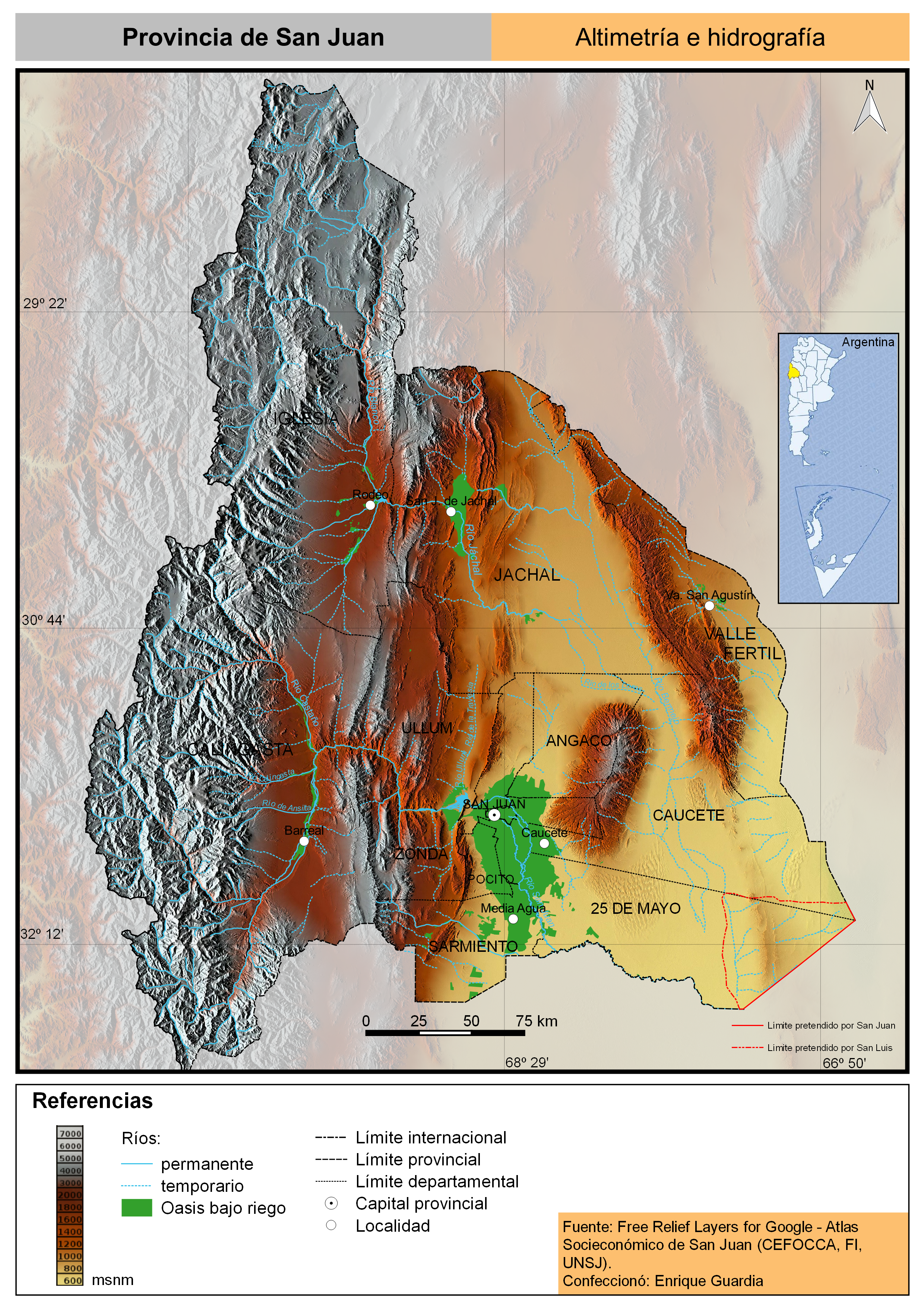 Mapa con la distribución de aspectos aritméticos e hidrográficos de la provincia de San Juan, Argentina.